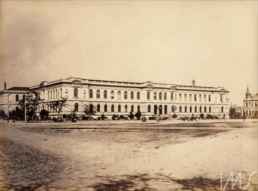 Álbum Fotografias de São Paulo 1900 - Praça da República (Escola Normal) Gaensly, Guilherme Data: 1890 décad Descrição: P&B i. 17 X 23 cm; s.p. 17,5 X 23,5 cm; s.s. 24,5 X 33 cm (álbum) Gelatina/ Prata Localidade: São Paulo Centro SP Brasil Fonte: Mestres do Séc. XIX Álbum Fotografias de São Paulo - 1900